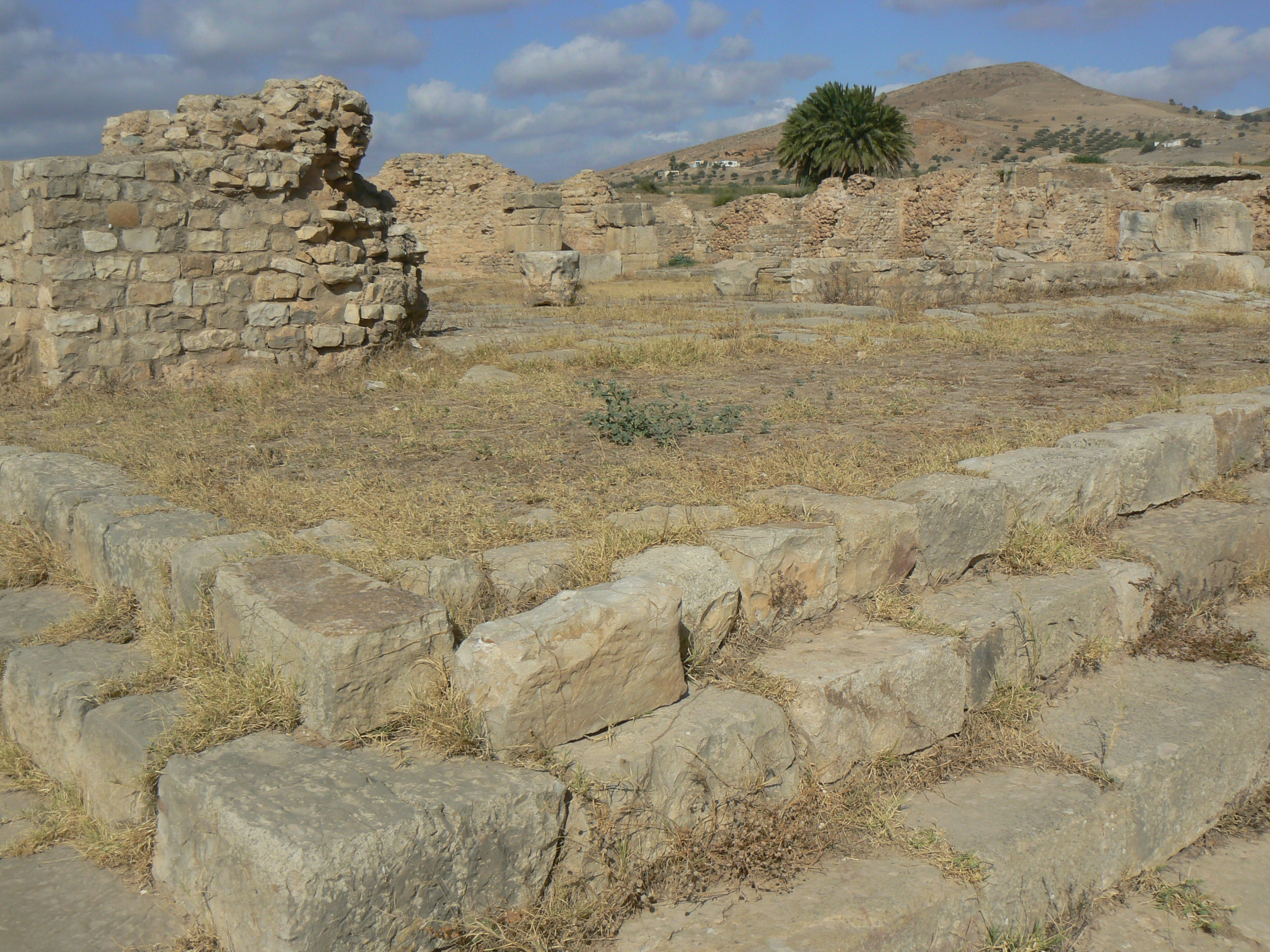 esplanade à Bulla Regia, vers les thermes, avec les boutiques du marché